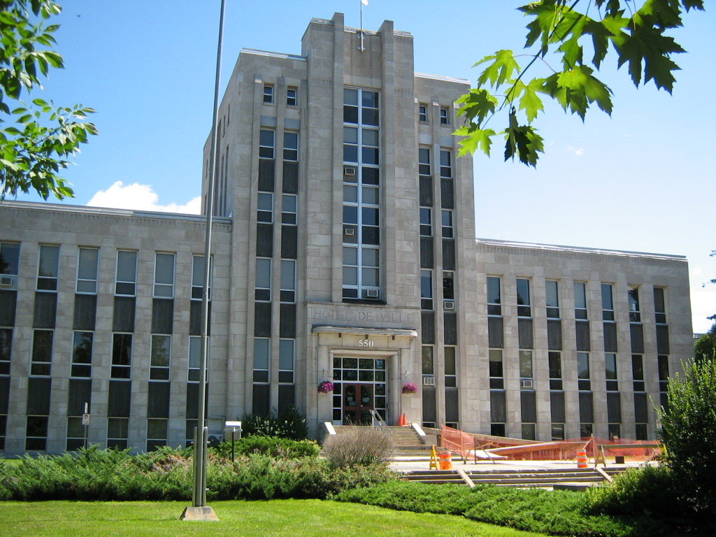 Hôtel de ville de Shawinigan, Québec (Canada)